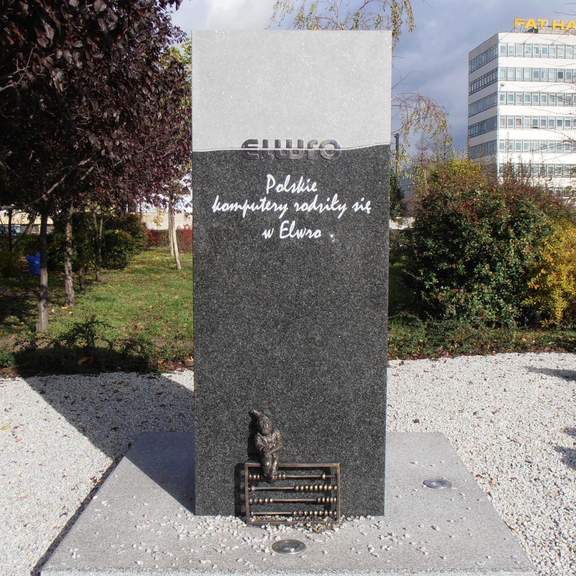 Wrocław. Skwer Elwro. Obelisk.